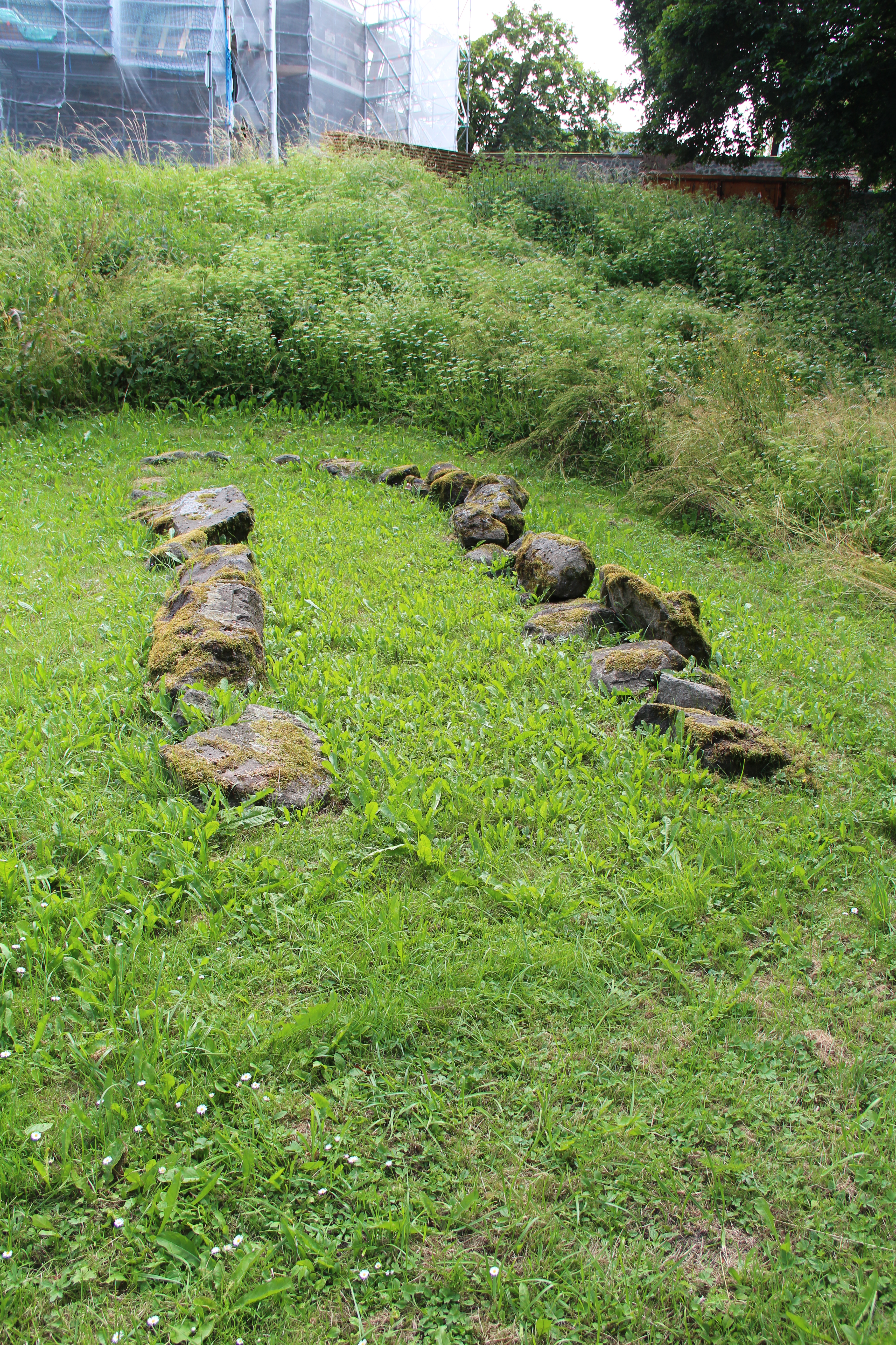 Kalkbrennofen auf dem Schiffenberg bei Gießen